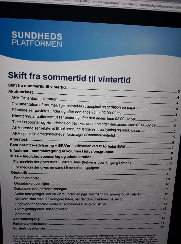 Ved brug af Sundhedsplatformen, er der en 17 siders beskrivelse af hvordan skift til/fra sommertid skal håndteres.